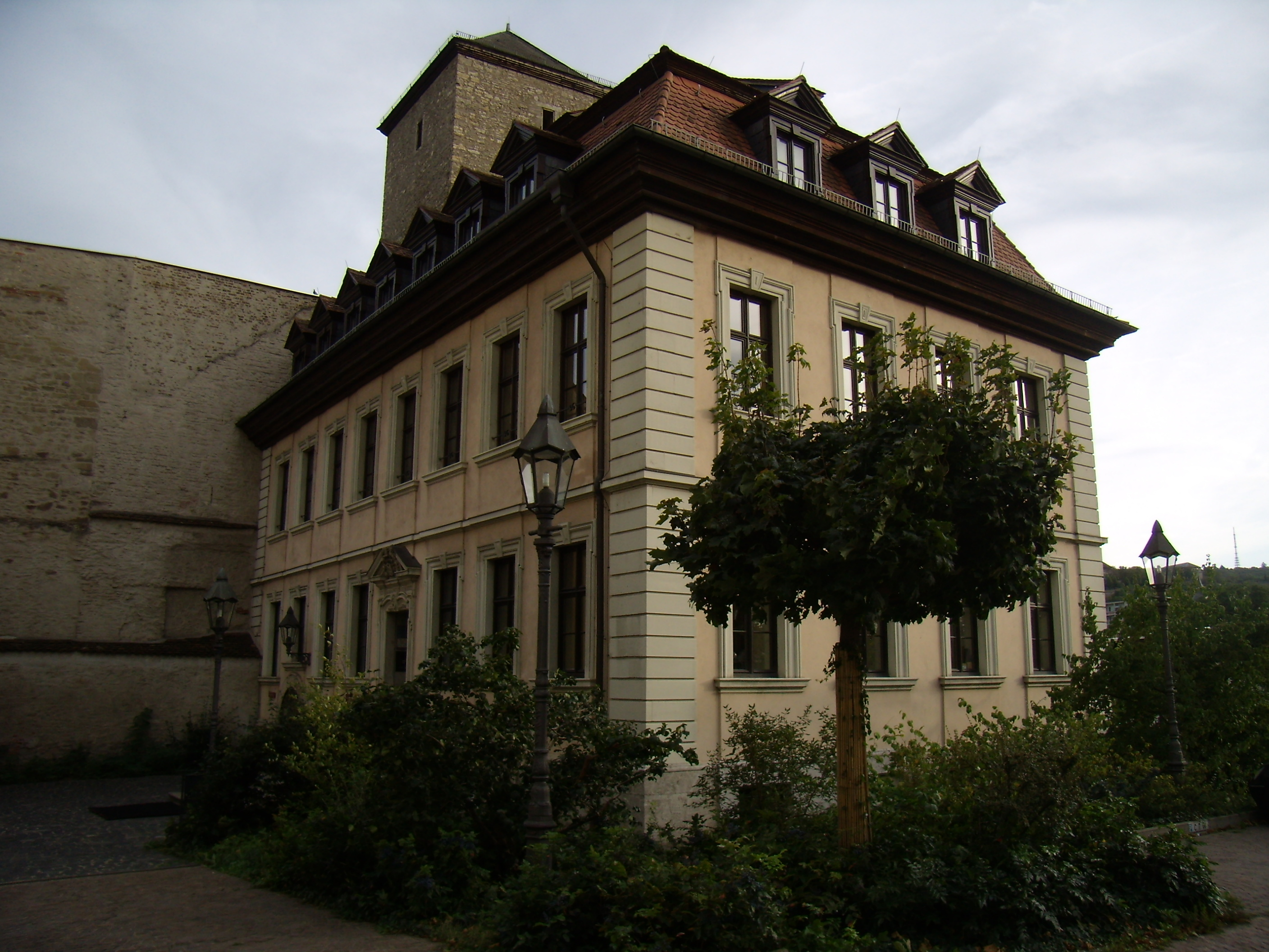 Würzburg - Turmgasse 11